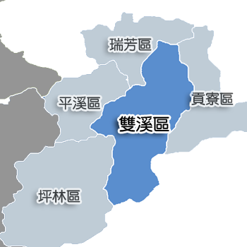 雙溪區相對位置。